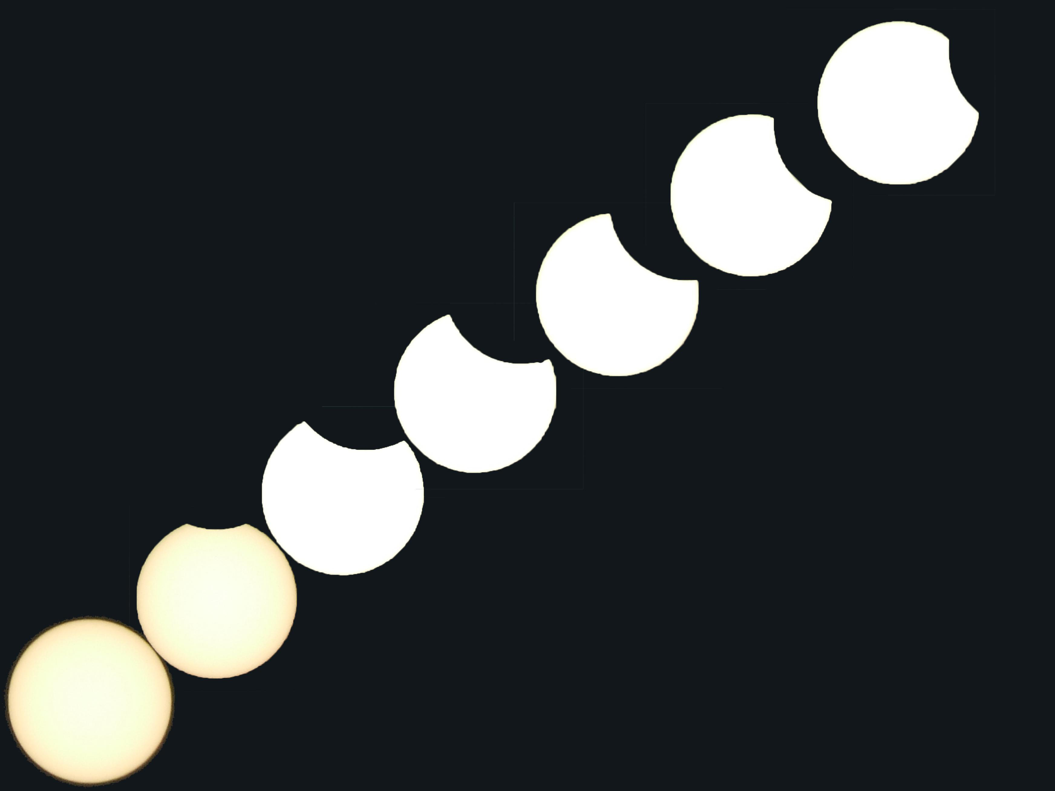 Eclipse Parcial do Sol Campinas/SP - Brasil 11/09/2007